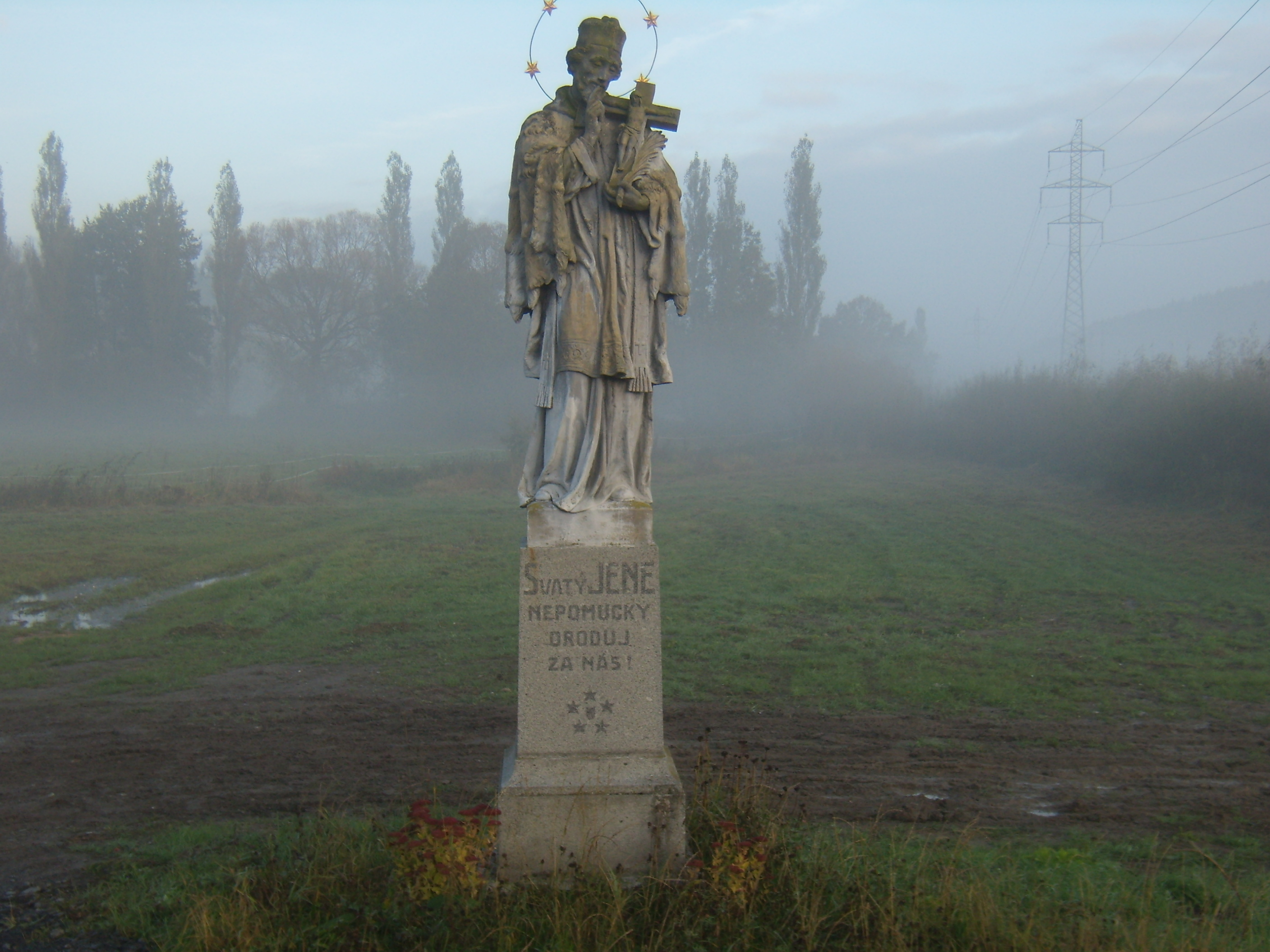 Tajanov - sv. Jan Nepomucký